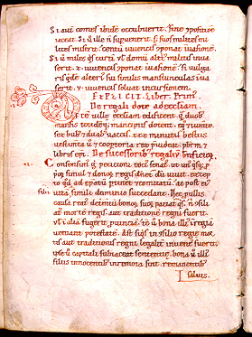 Admonti-kódex (12. század)